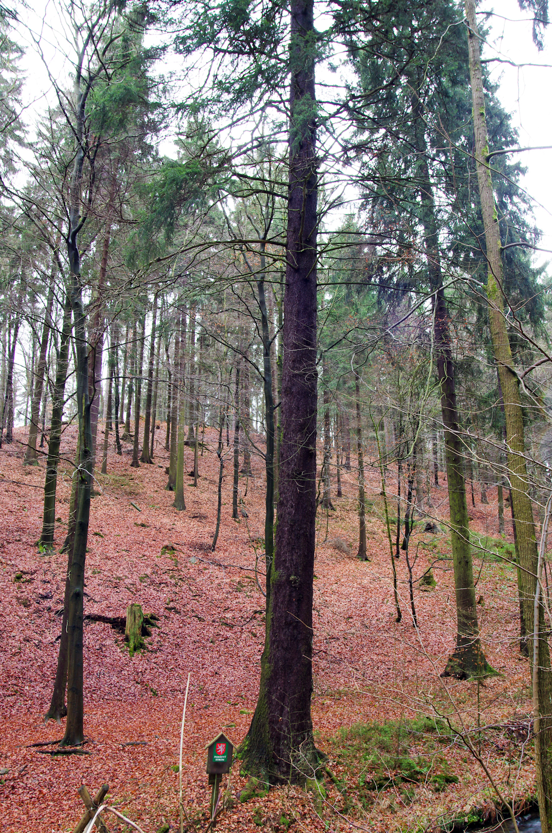 památný strom - smrk pod Hartenberkem, okres Sokolov